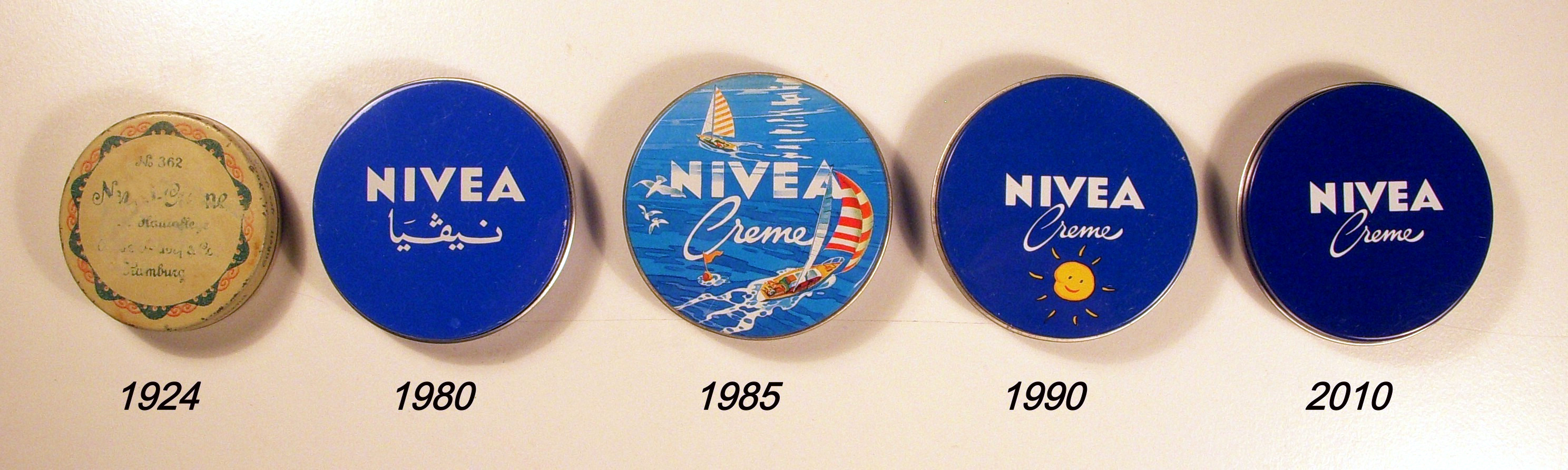 Samling NIVEA-burkar från 1924 till 2010